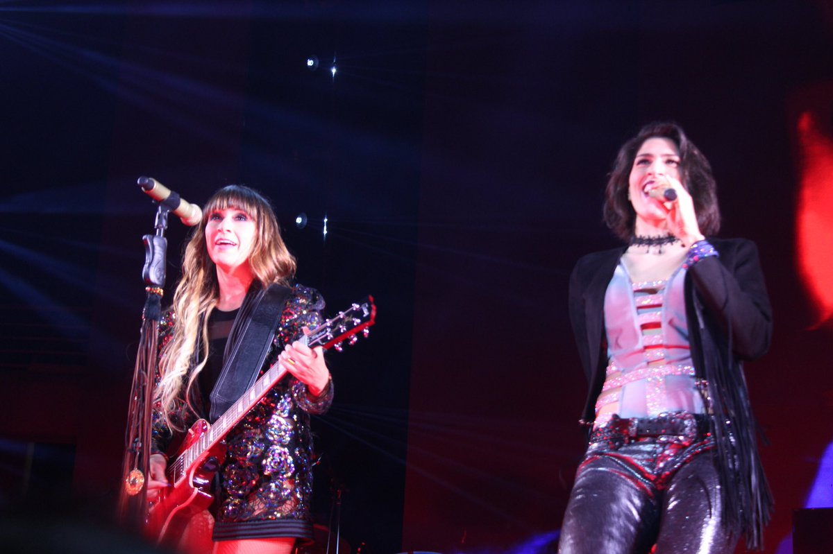 Ha*Ash en el movistar arena de Chile